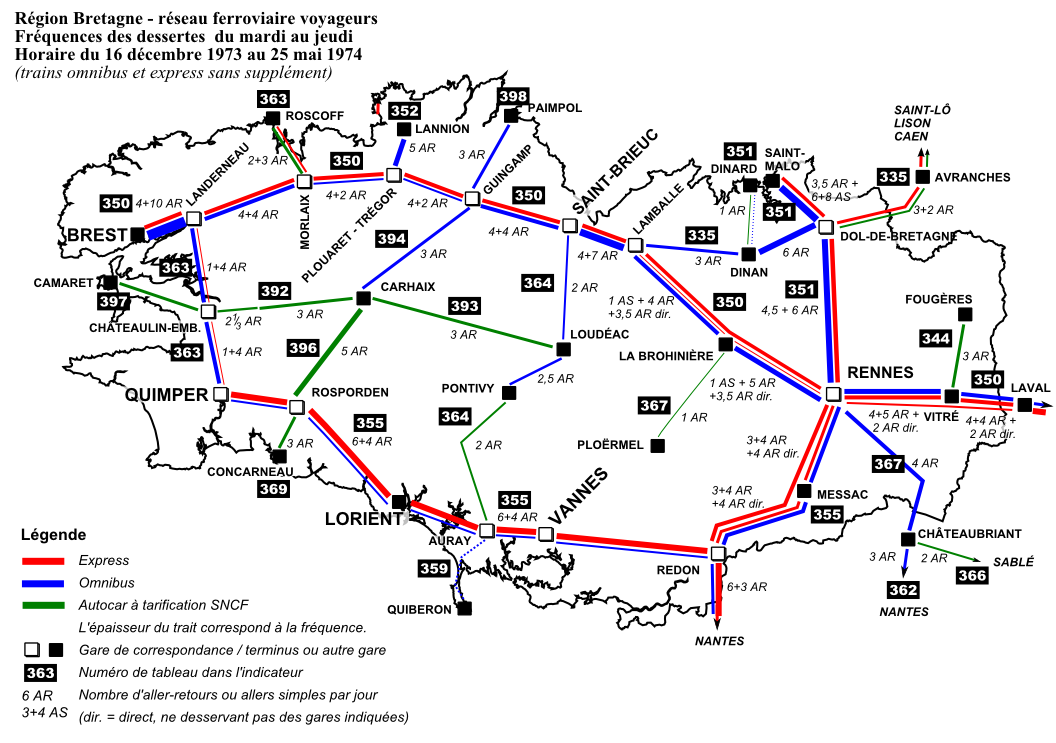 Région Bretagne, réseau ferroviaire voyageurs, fréquence de la desserte, horaire du 16 décembre 1973 au 25 mai 1974, omnibus et express (trains équivalents aux TER et Intercités sans réservation obligatoire).